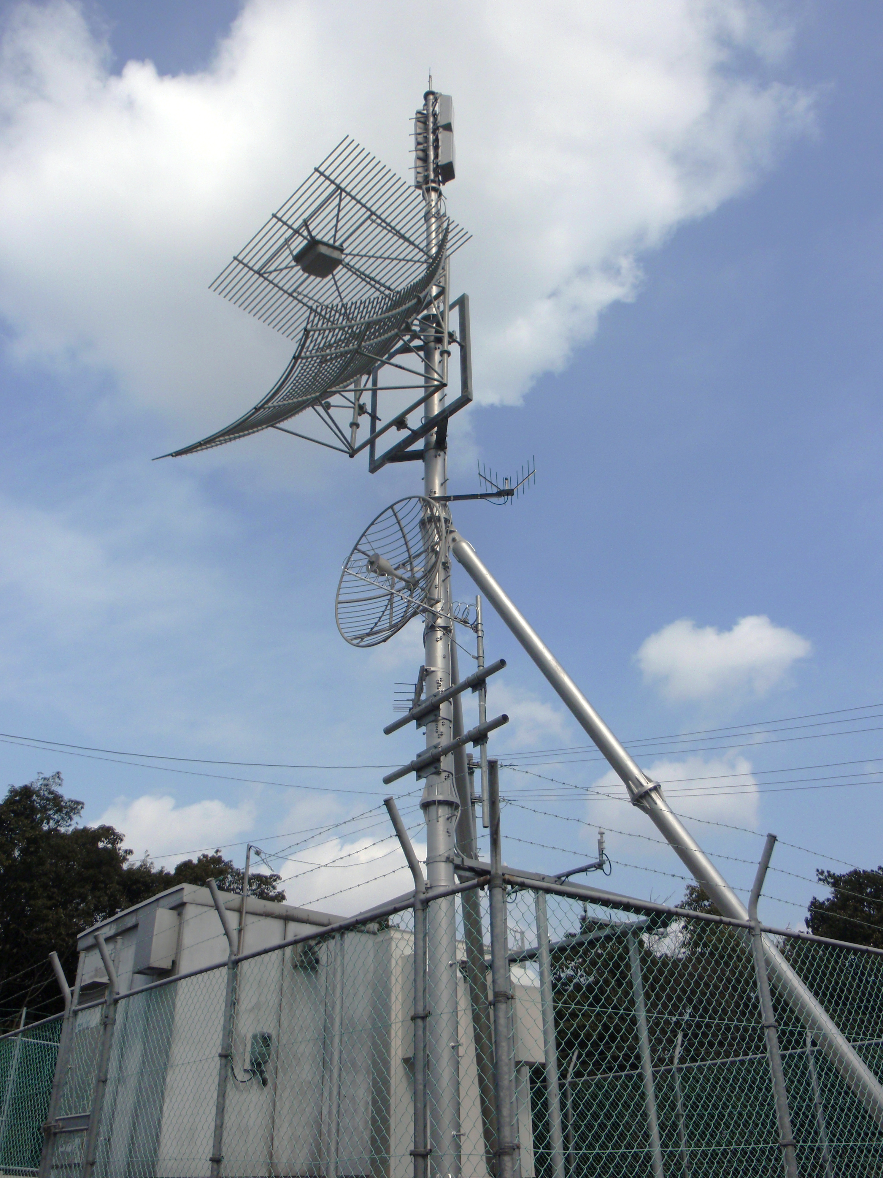 香川県高松市国分寺町の兎子山にある民放の国分寺テレビ中継局。